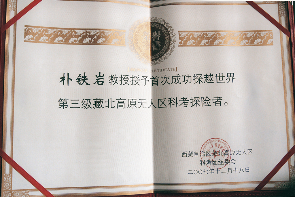 박철암 교수는 세계 최초로 무인구 탐험에 성공한 탐험가이다